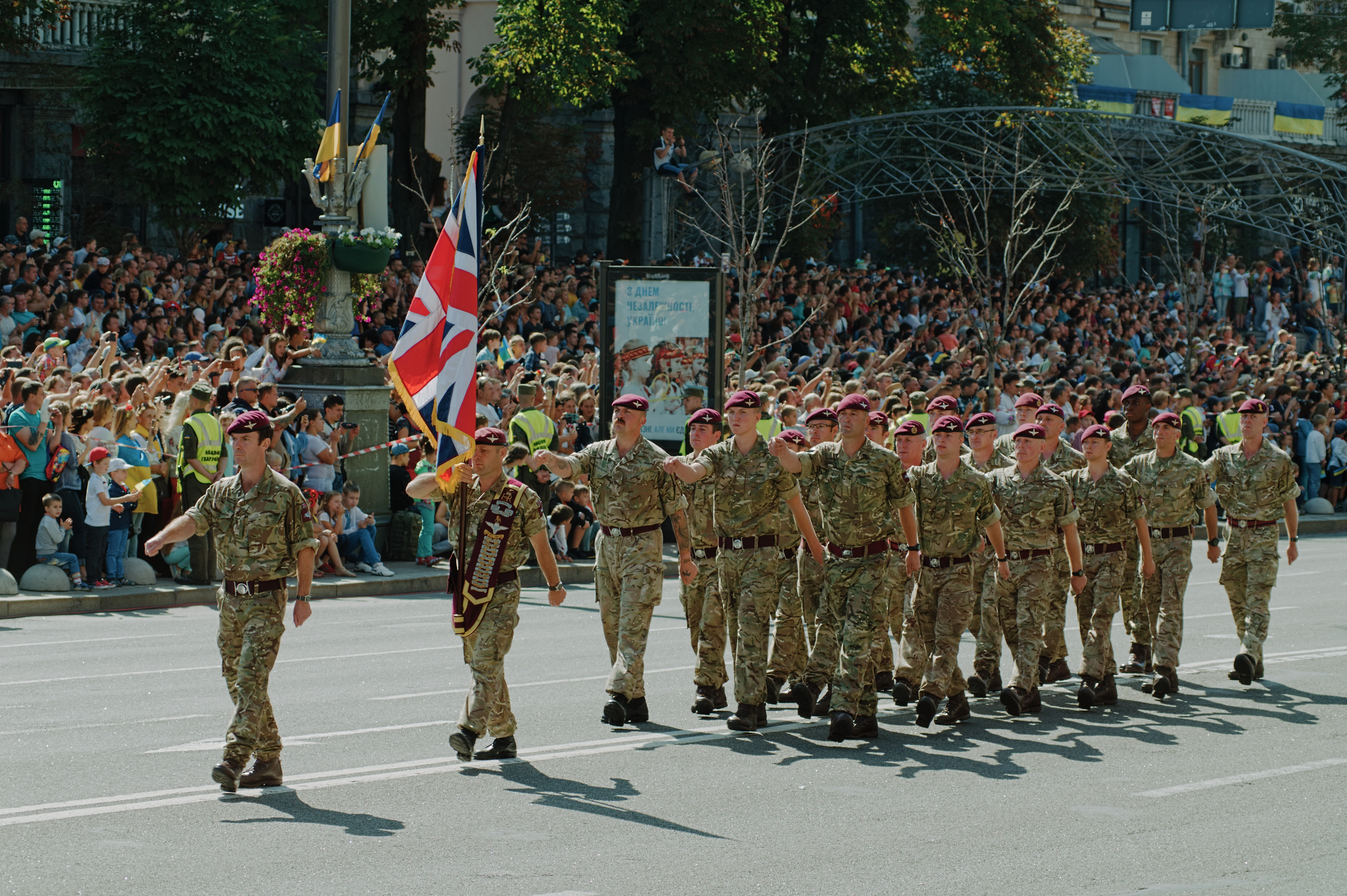 Военный парад в честь Дня Независимости Украины / Military parade in honor of the Independence Day of Ukraine